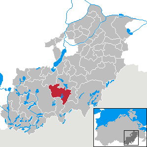 Carpin in Mecklenburg-Vorpommern, Landkreis Mecklenburg-Strelitz